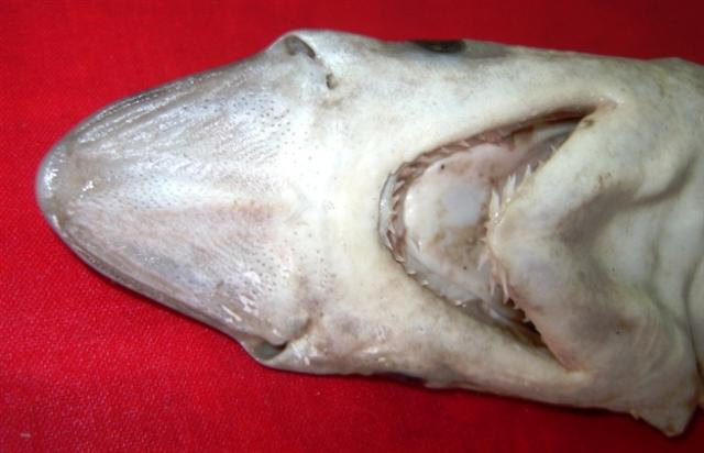 Pakistan, Karachi, 20-5-2013, 50 cm